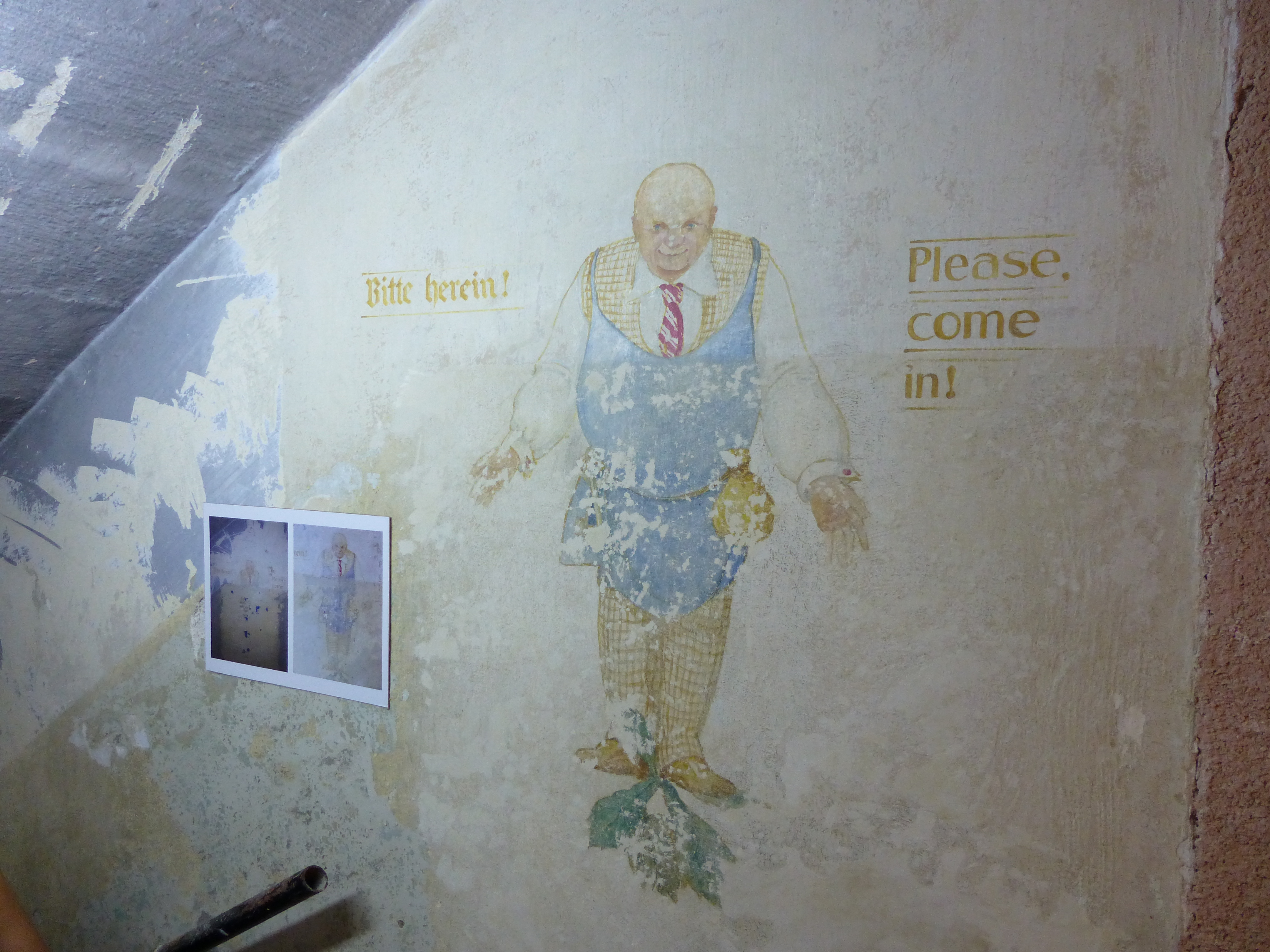 מלון פאר שהוקם בסוף המאה ב-19 במושבה הגרמנית. החדרים המפוארים במלון, שהיו מעוטרים בעיטורי סטנסיל על הקירות קיבלו שמות של נביאים ושליחים,. בשנות הארבעים עבר המלון לידיה של הבולשת הבריטית. לאחר קום המדינה שימש המבנה את משרד החינוך. לאחר שיקום בשנים האחרונות, הפך המלון לחלק ממתחם בנייה יוקרתי במושבה האמריקאית-גרמנית. This is a photo of a heritage building in Israel. Its ID is 3-5000-034